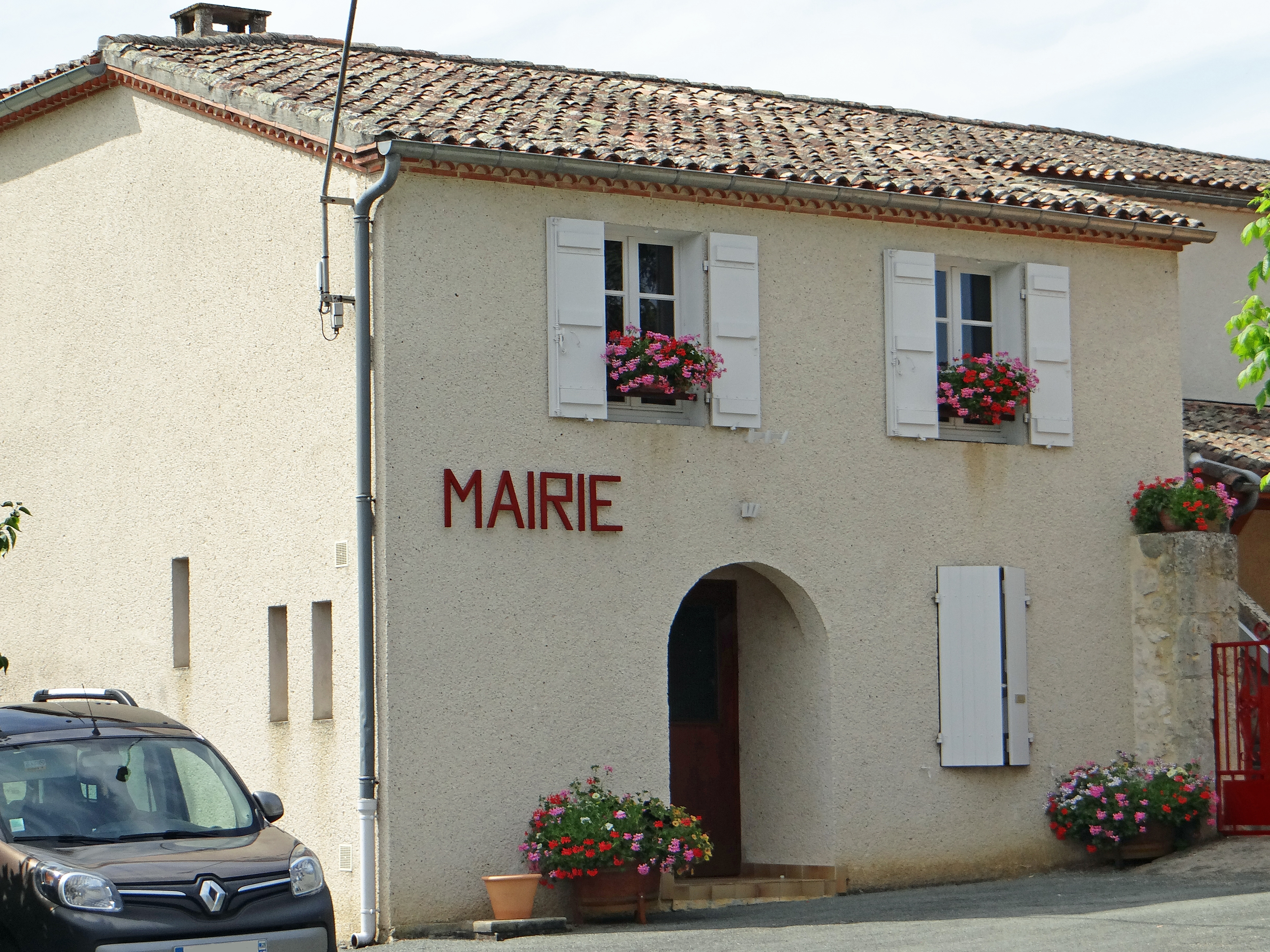 Saint-Pierre-de-Buzet - Mairie